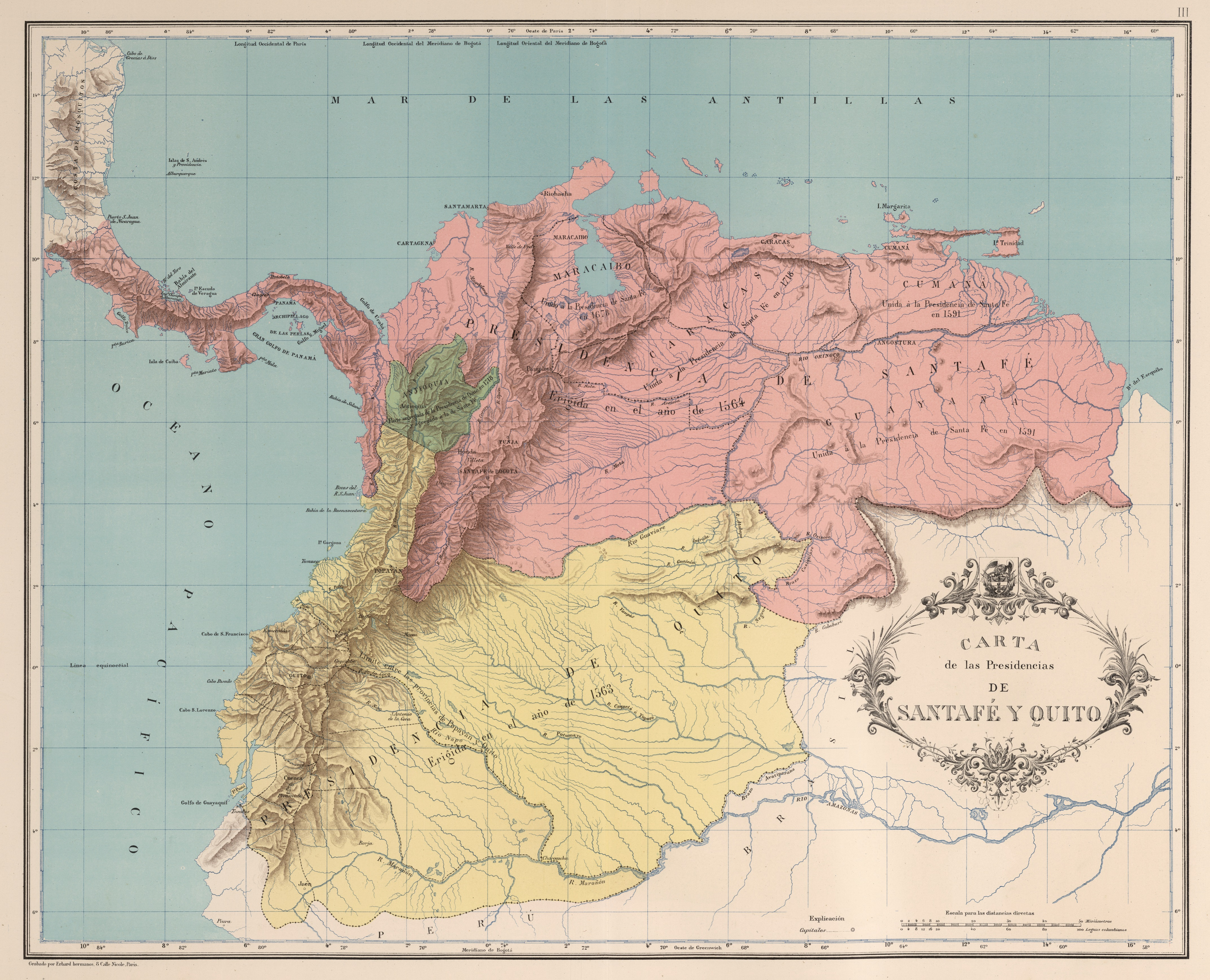 Carta de las presidencias de Santafé y Quito (1564). Carta III del Atlas geográfico e histórico de la República de Colombia, 1890.